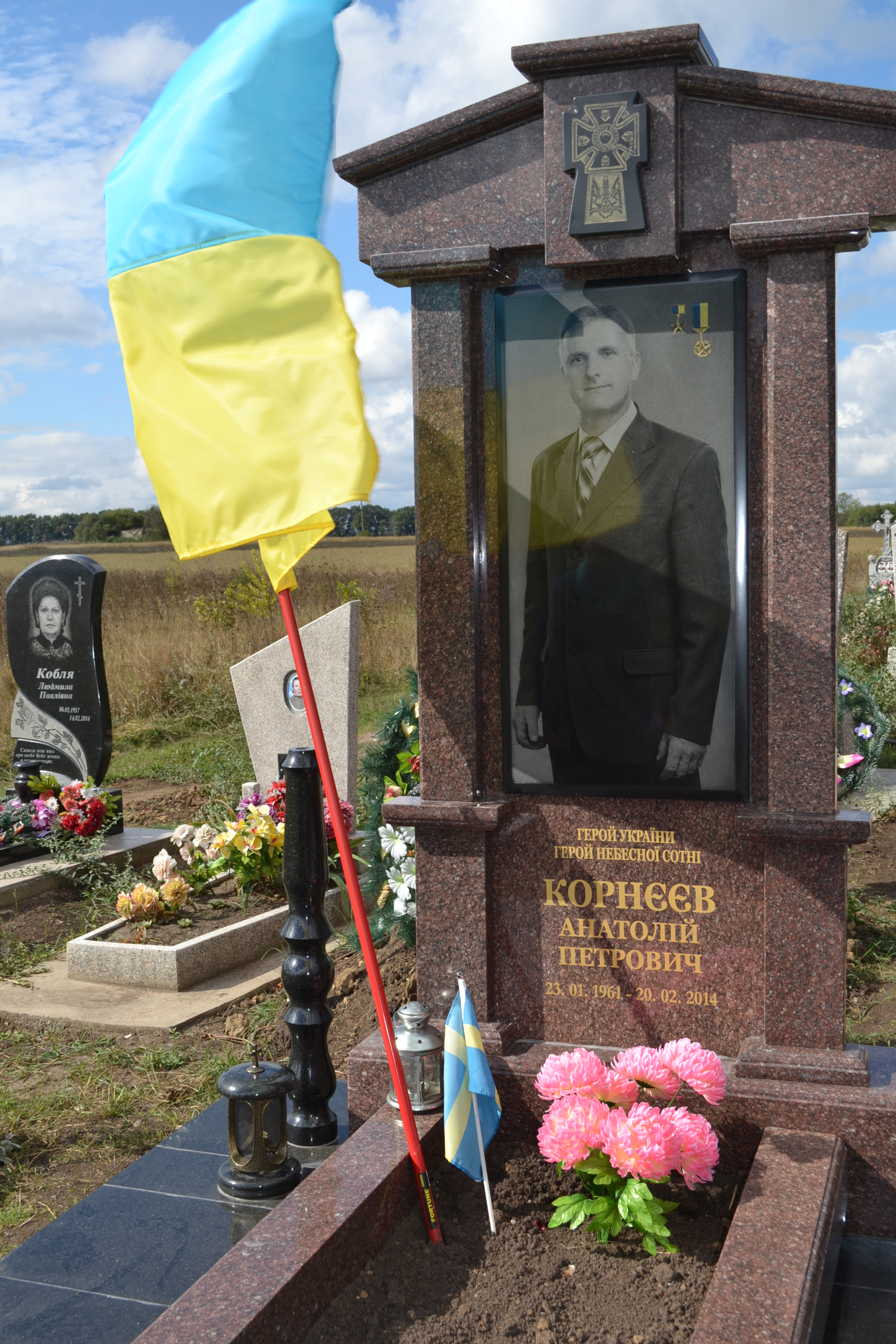 Анатолій Петрович Корнєєв — активіст Євромайдану. Рудський сільський голова (Хмельницька область). Убитий пострілом снайпера 20 лютого 2014 на Інститутській вулиці. Один із громадського списку національної скорботи «Небесна Сотня». Герой України.